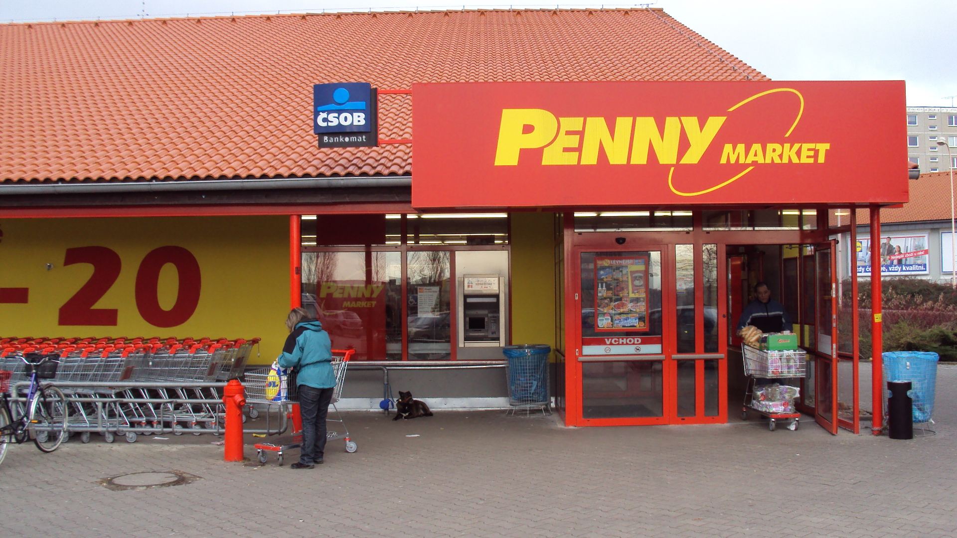 Prodejna Penny Marketu v České Lípě